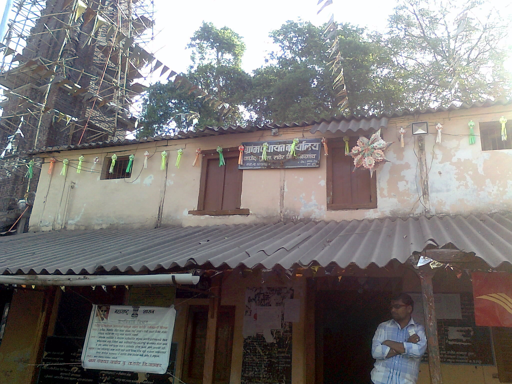 Gram Panchayat at Waghode Bk in Raver Taluka, Jalgaon district, Maharashtra, India